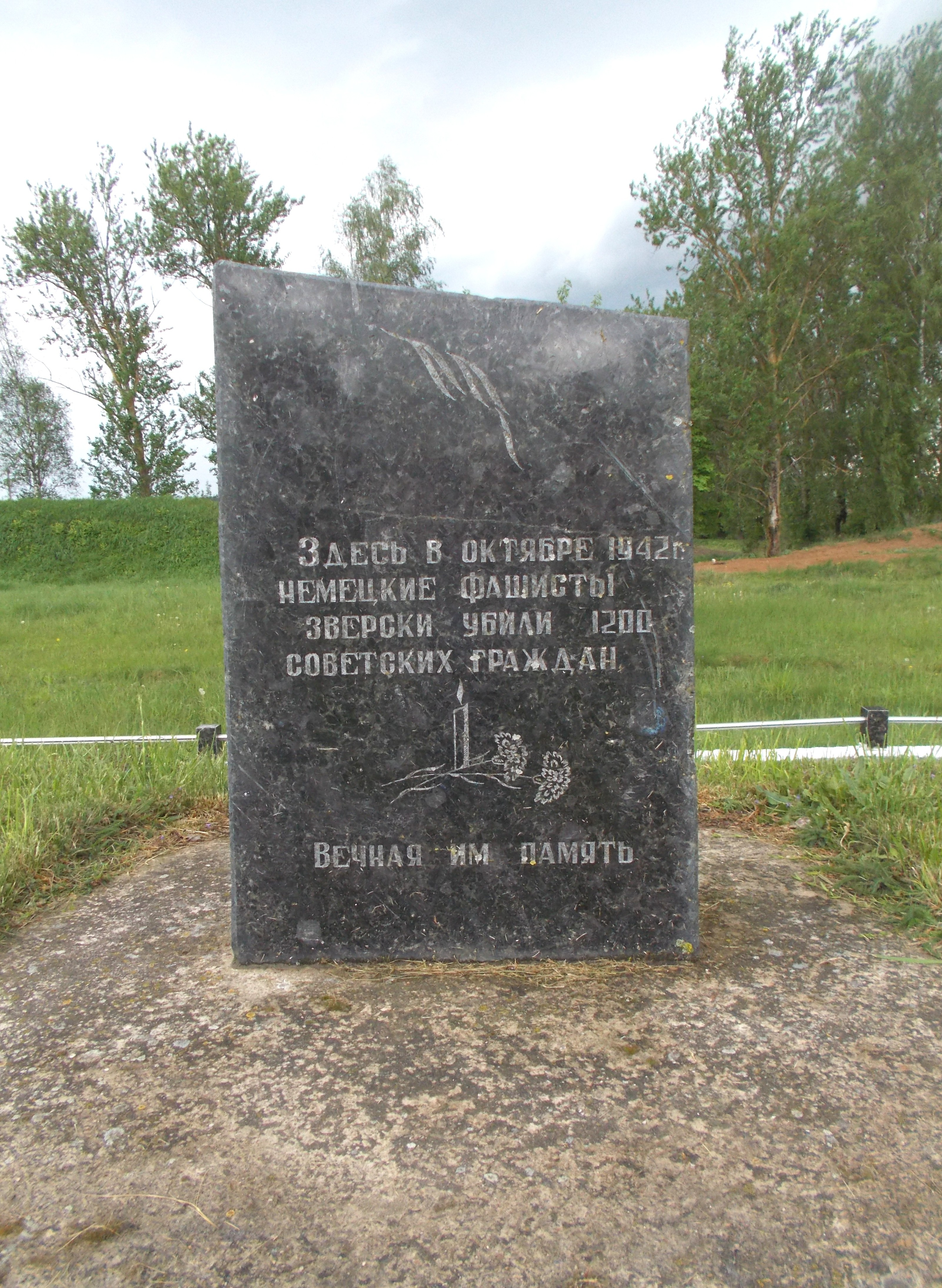 Памятник 1200 евреям Несвижа, убитым в октябре 1942 года. Находится на улице Сновская - напротив через дорогу от дома № 4.